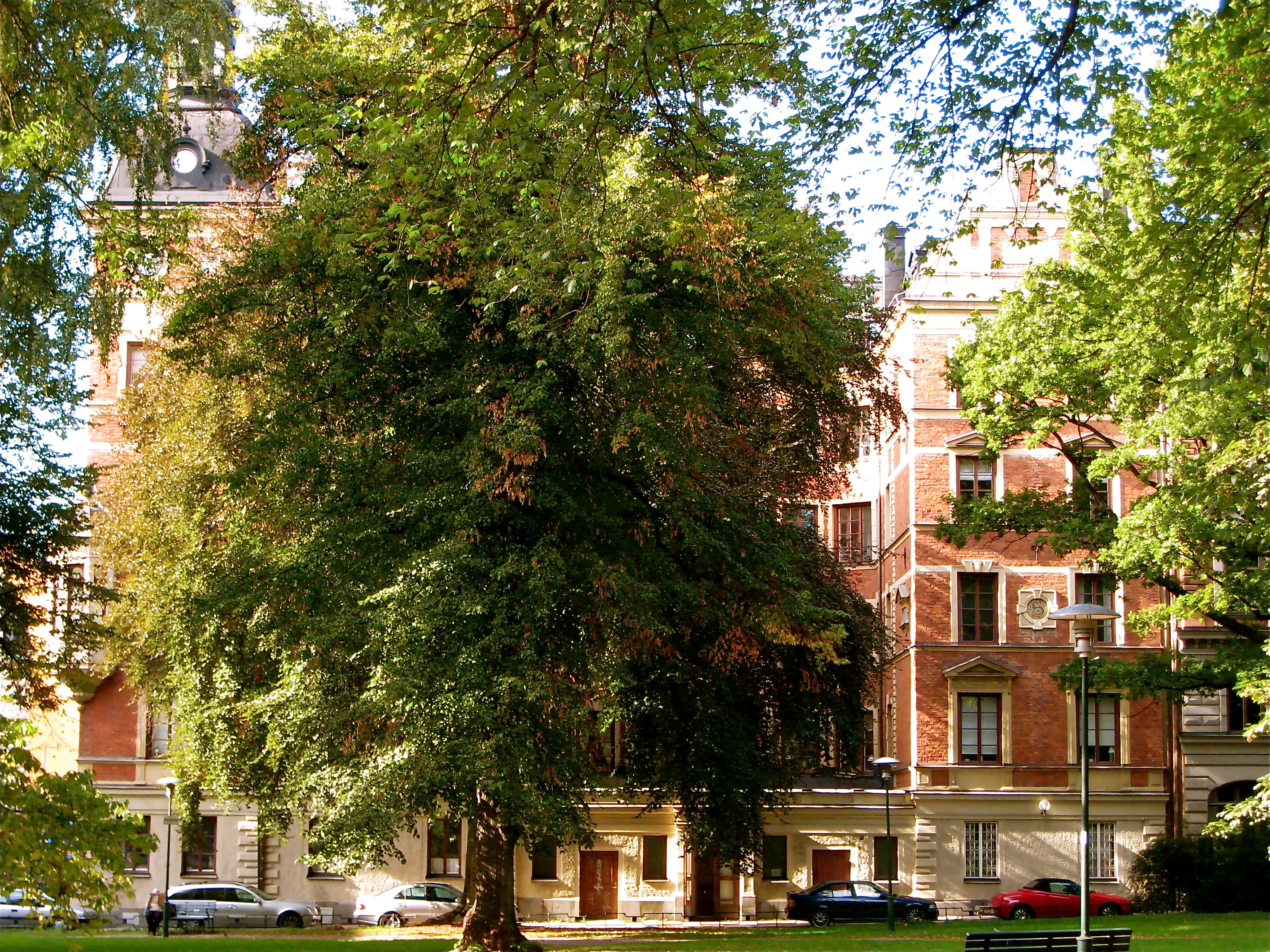 Rosenborgshuset från 1883 sett från Stureparken. Arkitekt: Ferdinand Boberg.